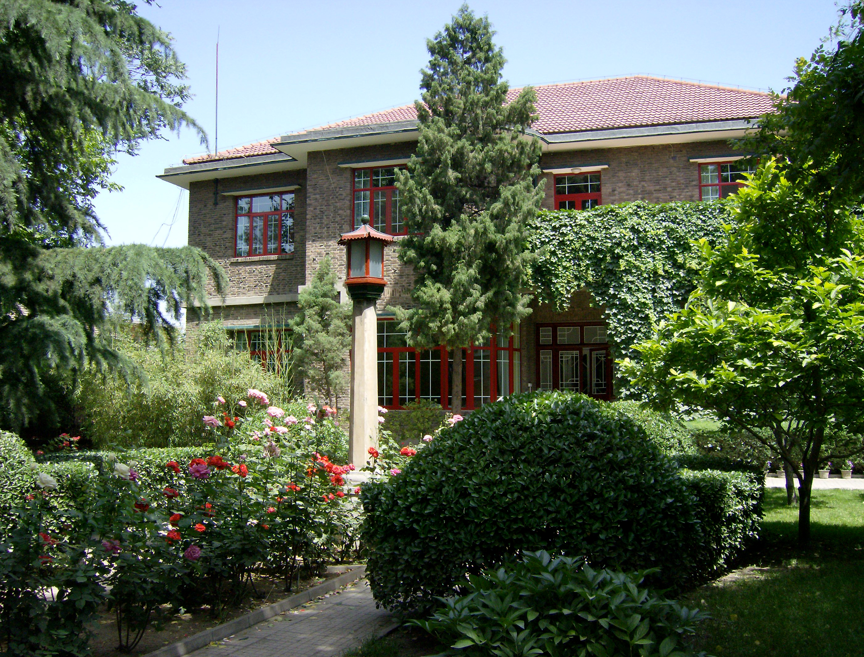 D'lëtzebuergesch Ambassade (Residenz) zu Peking, Mee 2007.